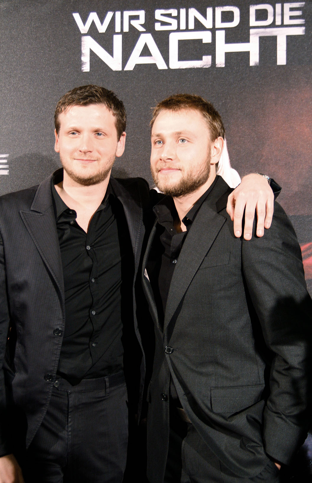 Dennis Gansel und Max Riemelt bei der Österreichpremiere von Wir sind die Nacht im Apollo Kino in Wien.